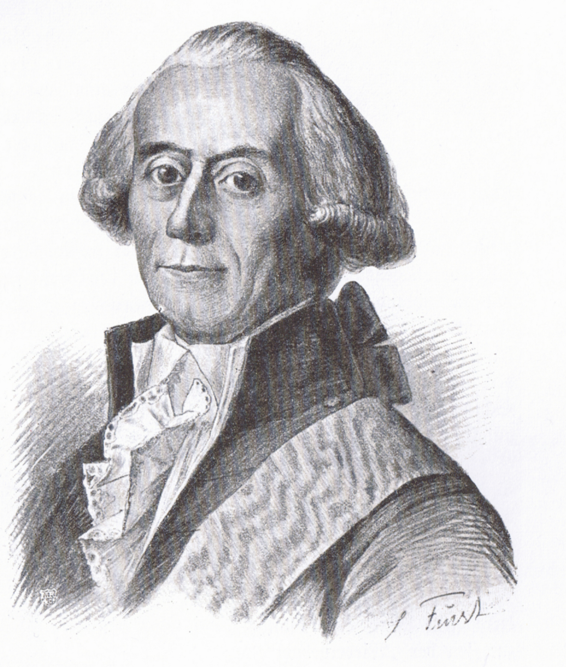 Andreas Peter Bernstorff (1735-1797) Außenminister des Dänischen Gesamtstaates von 1773 bis 1780 und von 1784 bis 1797, Zeichnung von Julius Fürst um 1895.